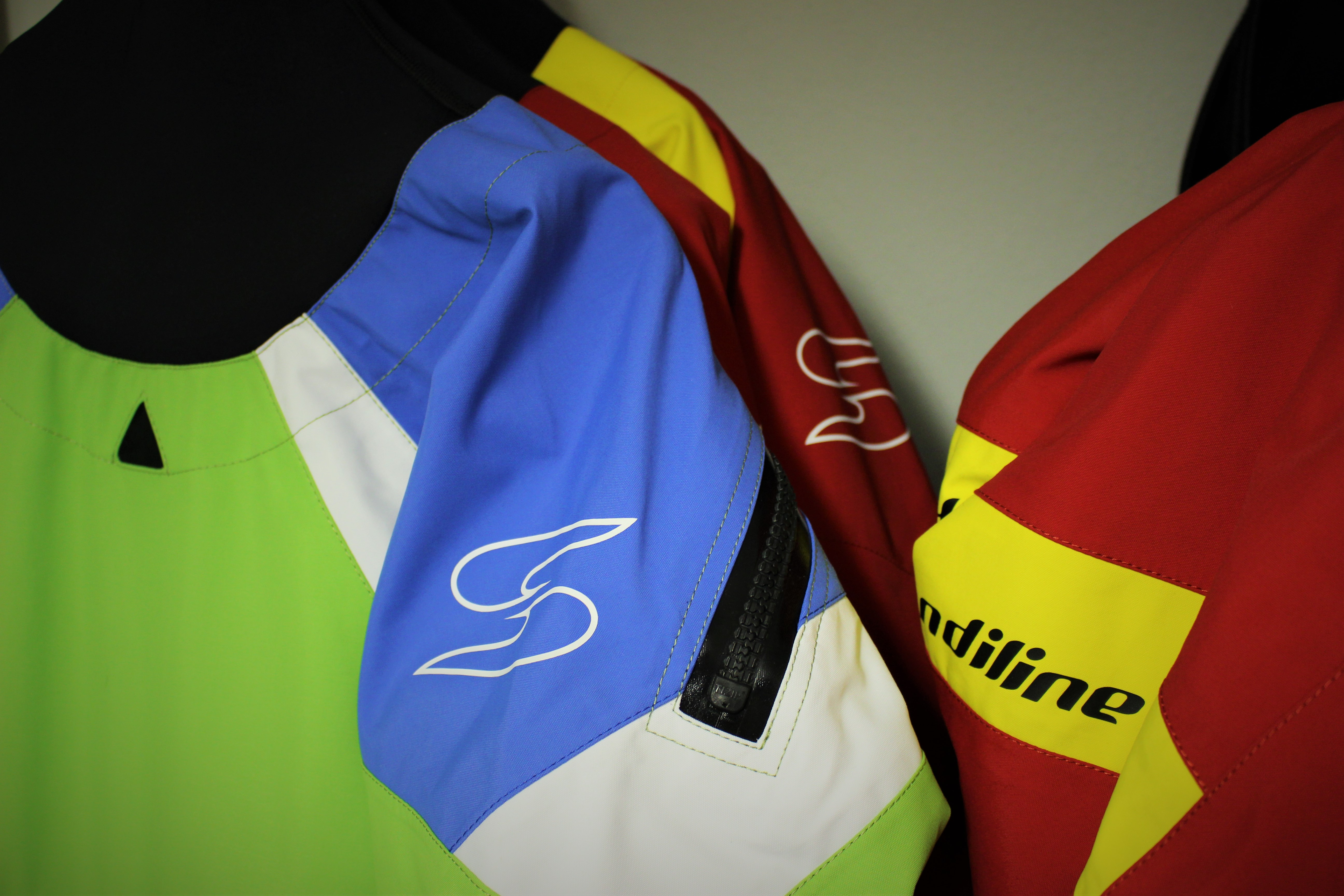 In foto un Idrocostume creato per il Soccorso Fluviale e Torrentismo.